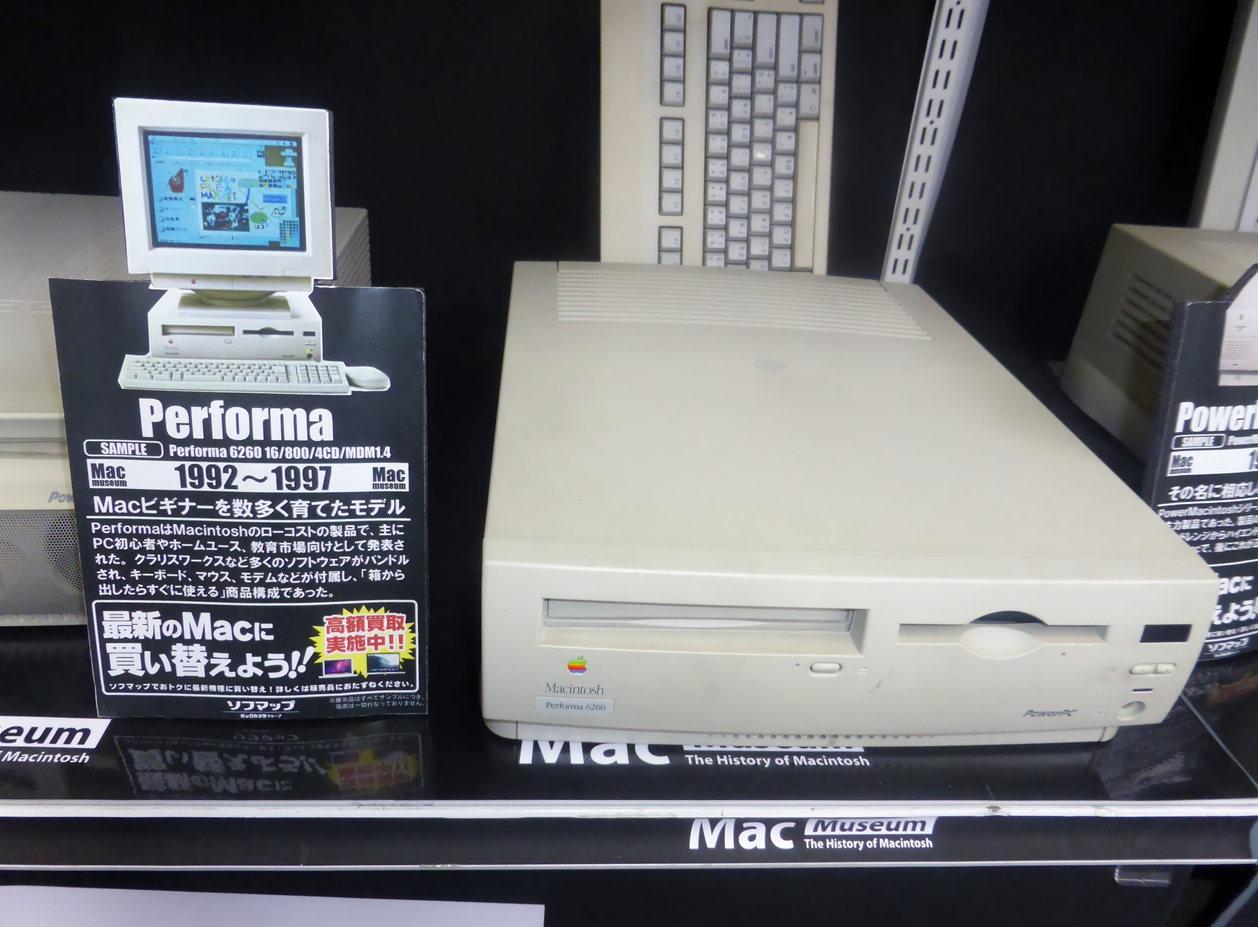 Macintosh Perfoma 6260を撮影。